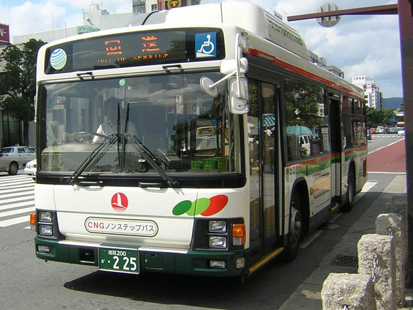 登録番号 姫路200か・225 姫路市交通局所属 2005年7月27日 姫路駅前にて撮影